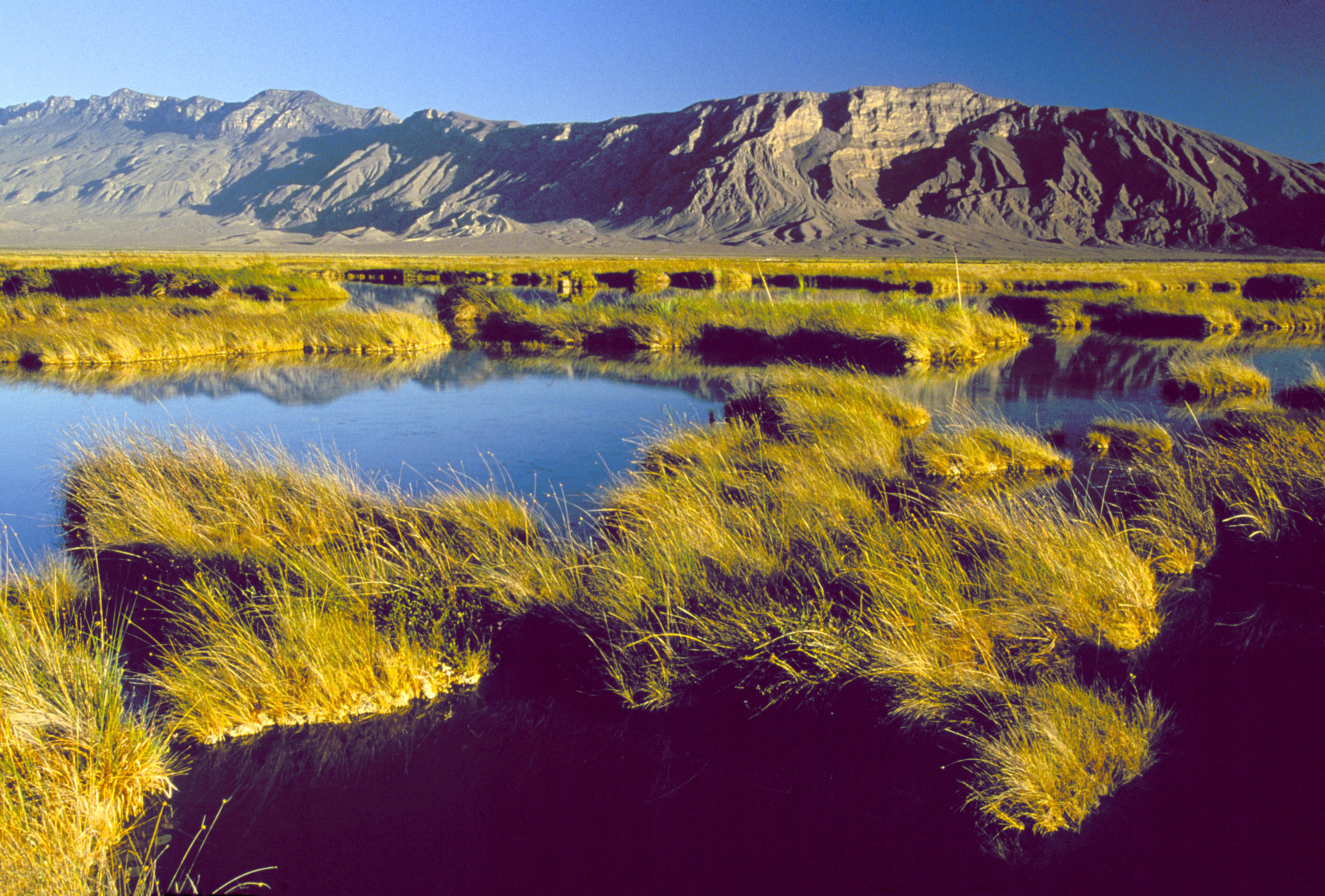 Cuatro Ciniegas, Coahuila